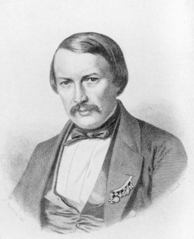 Portret van Hendrik Conscience